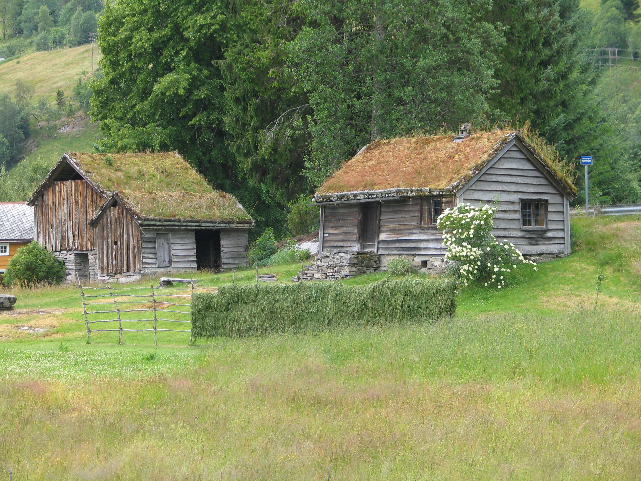 Movika: Husmannsplassen til Nils og Marte. Denne er i dag ein del av Sunnfjord Museum.